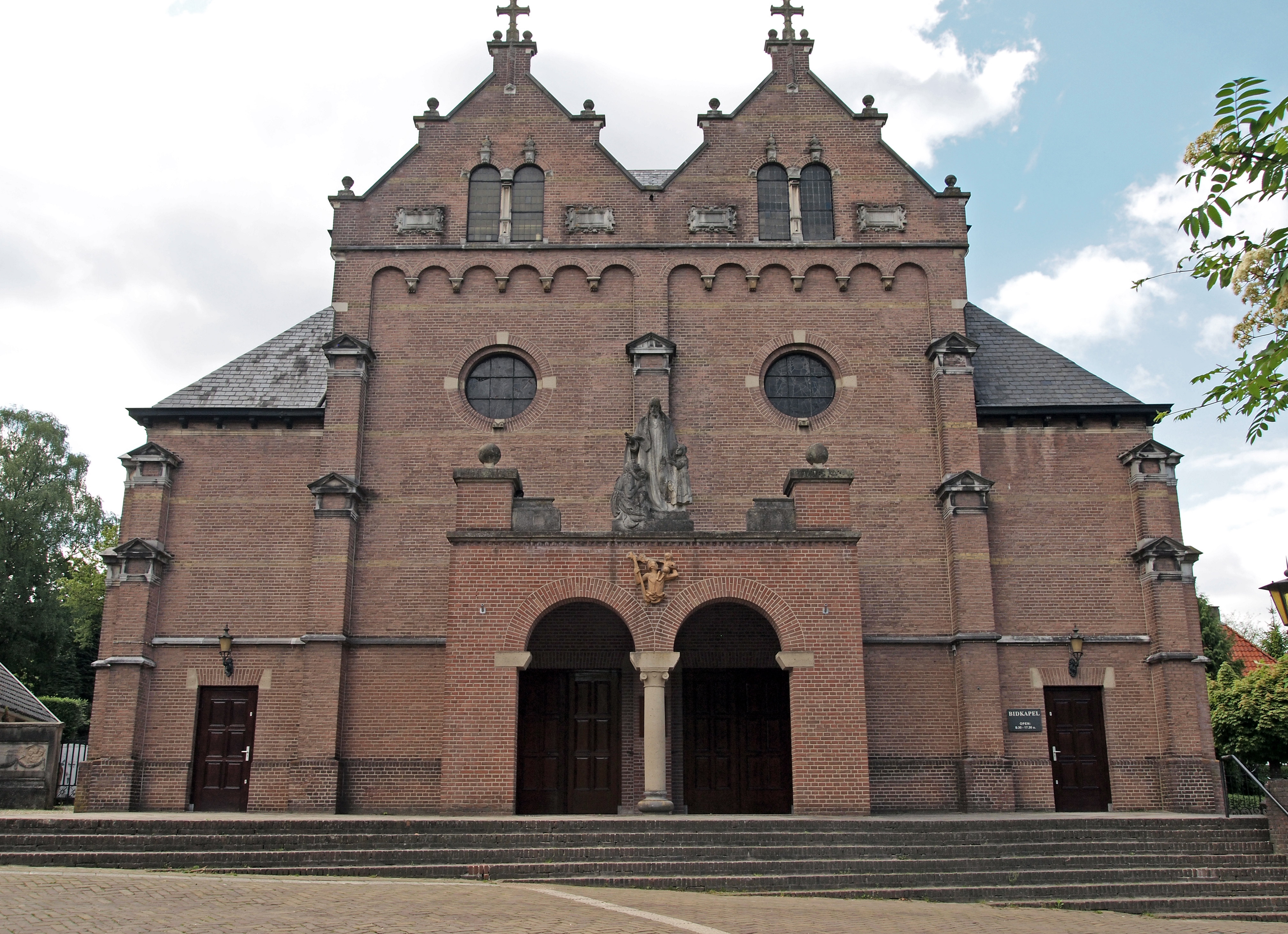 Bartholomeus in Beek